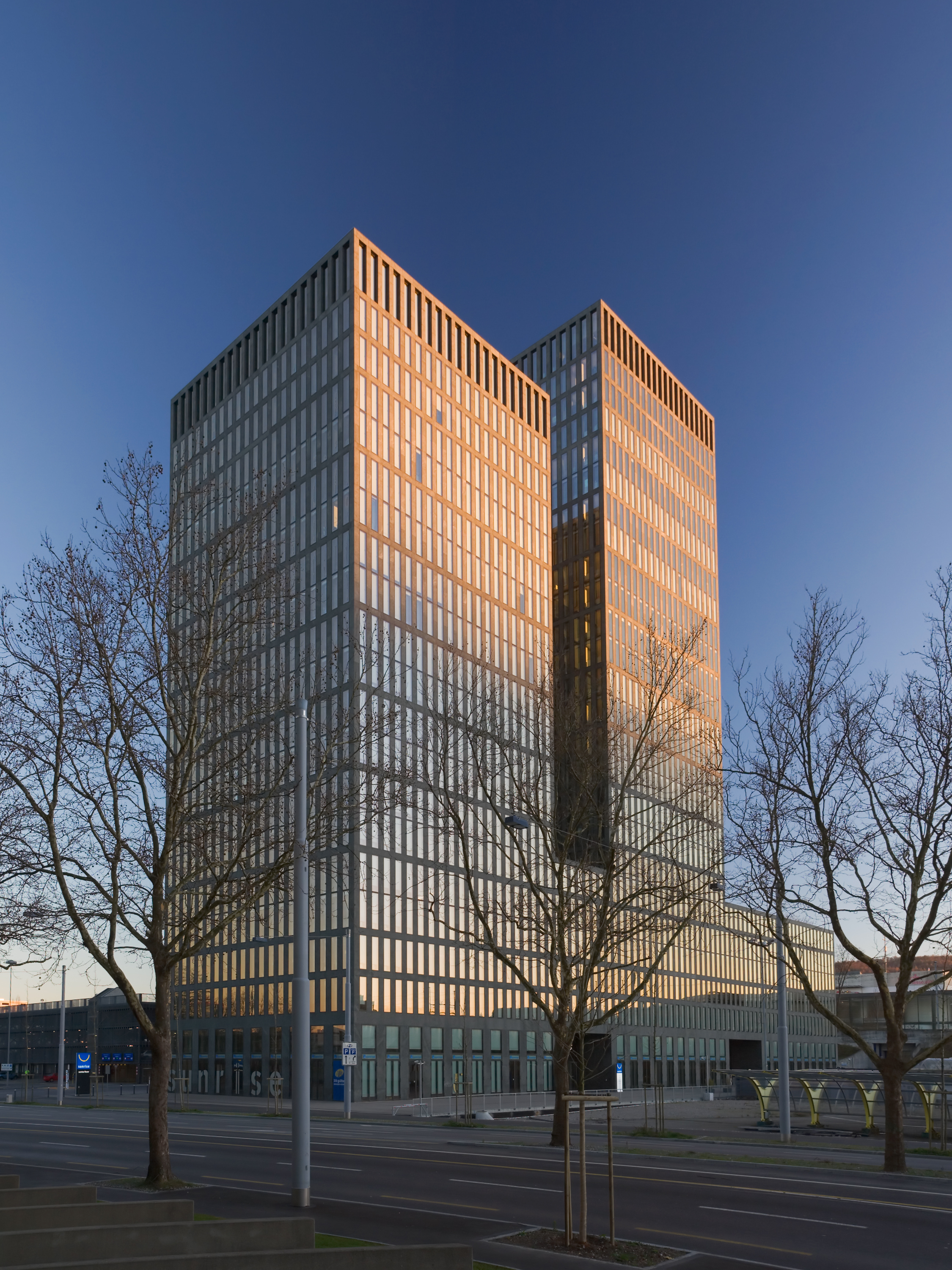 Das Sunrisehochhaus in Zürich Nord, Schweiz